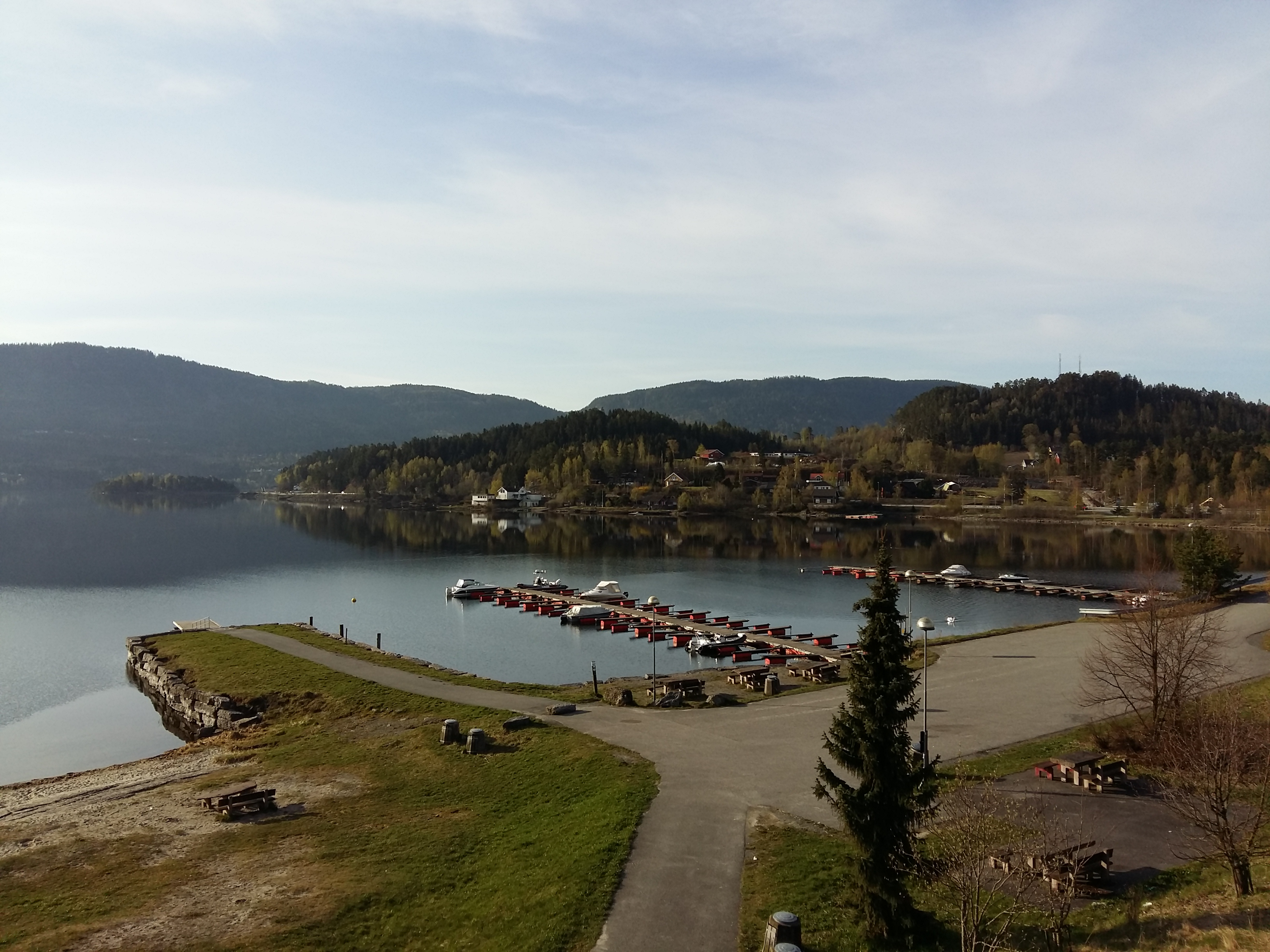 Vik i Hole kommune i Buskerud fylke i Norge.